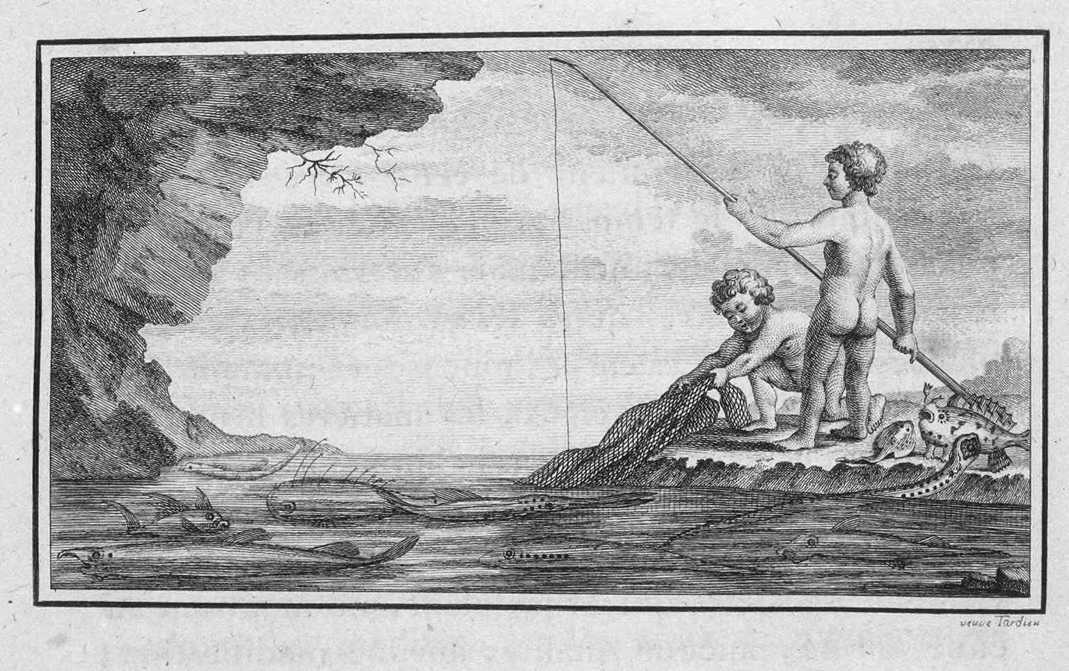 Deux enfants pêchant au bord d'une falaise, gravure sur cuivre